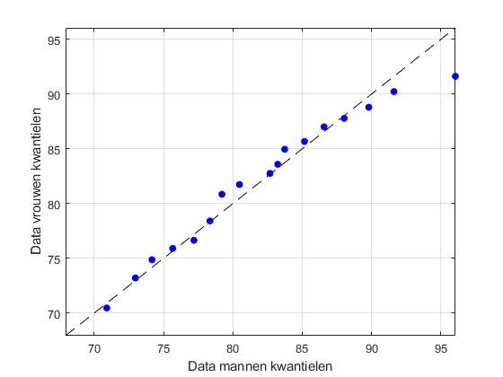 Een Q-Q plot met op de horizontale as de kwantielen van de dataset van het gewicht van mannen en op de verticale as een dataset met het gewicht van vrouwen. De punten verdelen zich rond de lijn y=x, zodoende kan men concluderen dat het gewicht van mannen en vrouwen vrijwel gelijk verdeeld is.